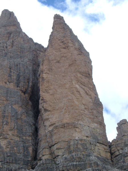 eigen werk Boven het midden van het gele rotsgedeelte aan de linkerzijde is een klimmer te zien als een zwart stipje. Hij bevindt zich solo (onbeveiligd)in de Cassin route